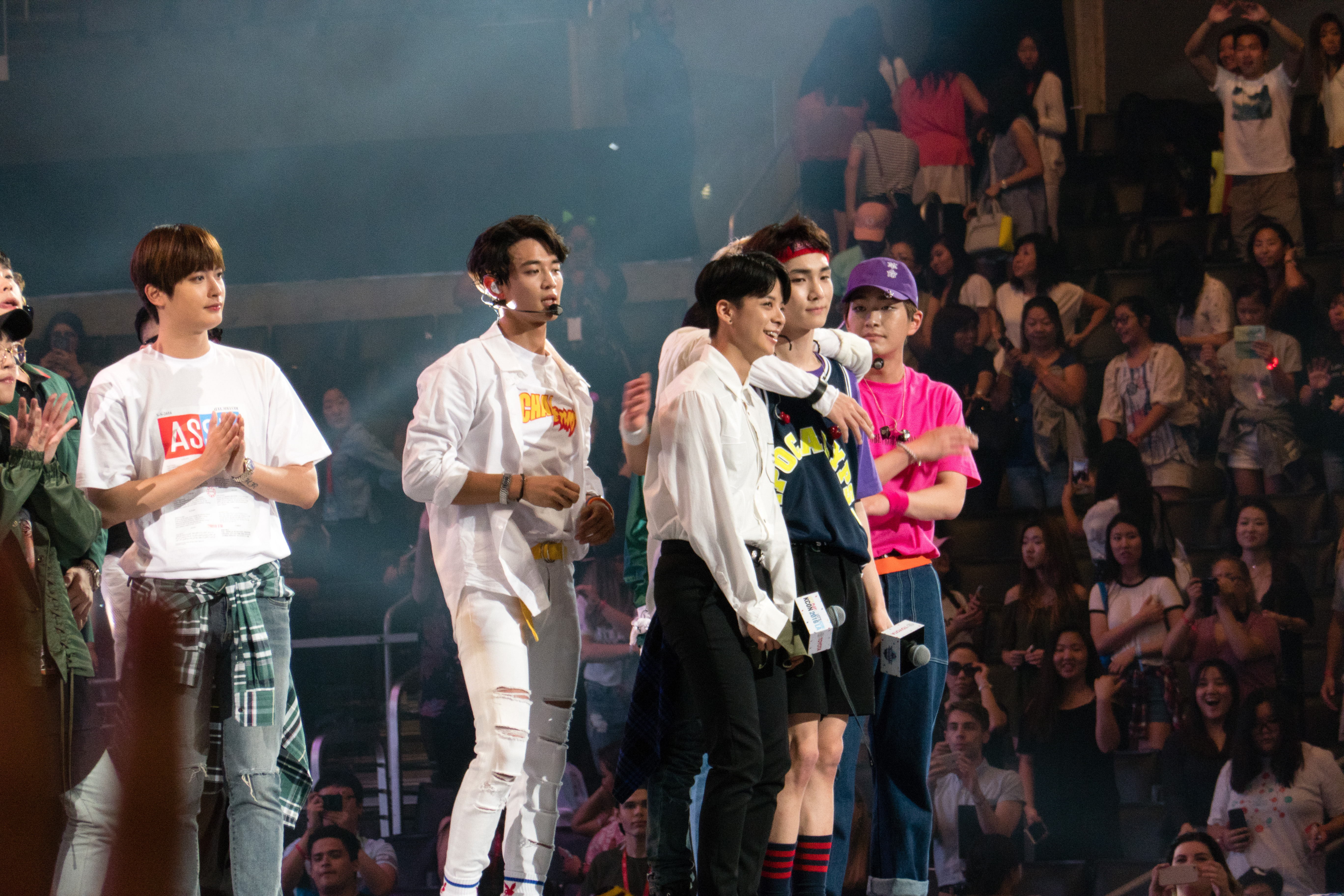 20160731-P1010094